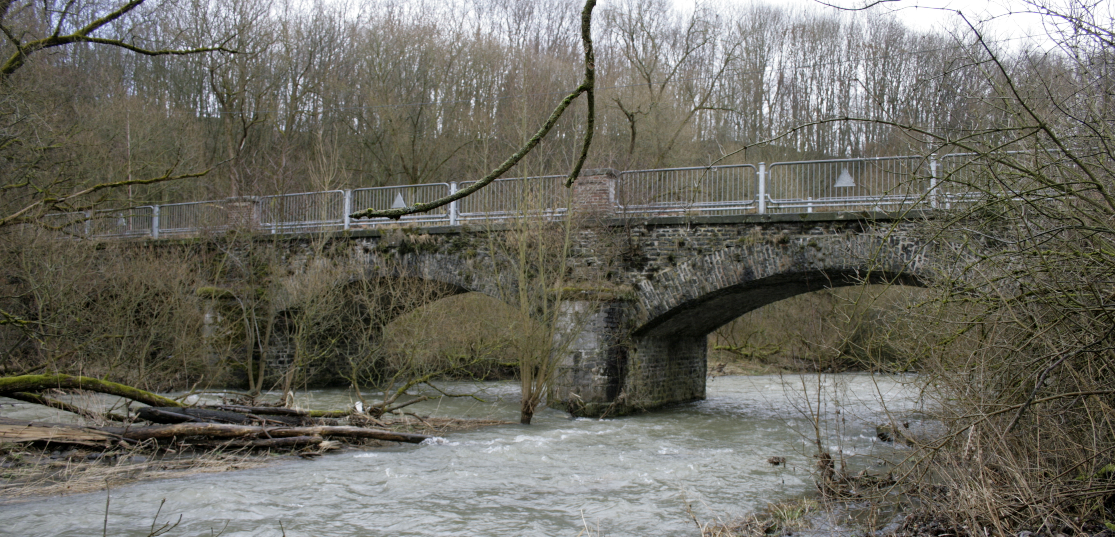 Brücke über den Elbbach bei Heuchelheim, Deutschland